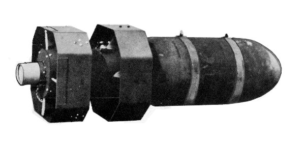 Amerykańska bomba VB-3 Razon